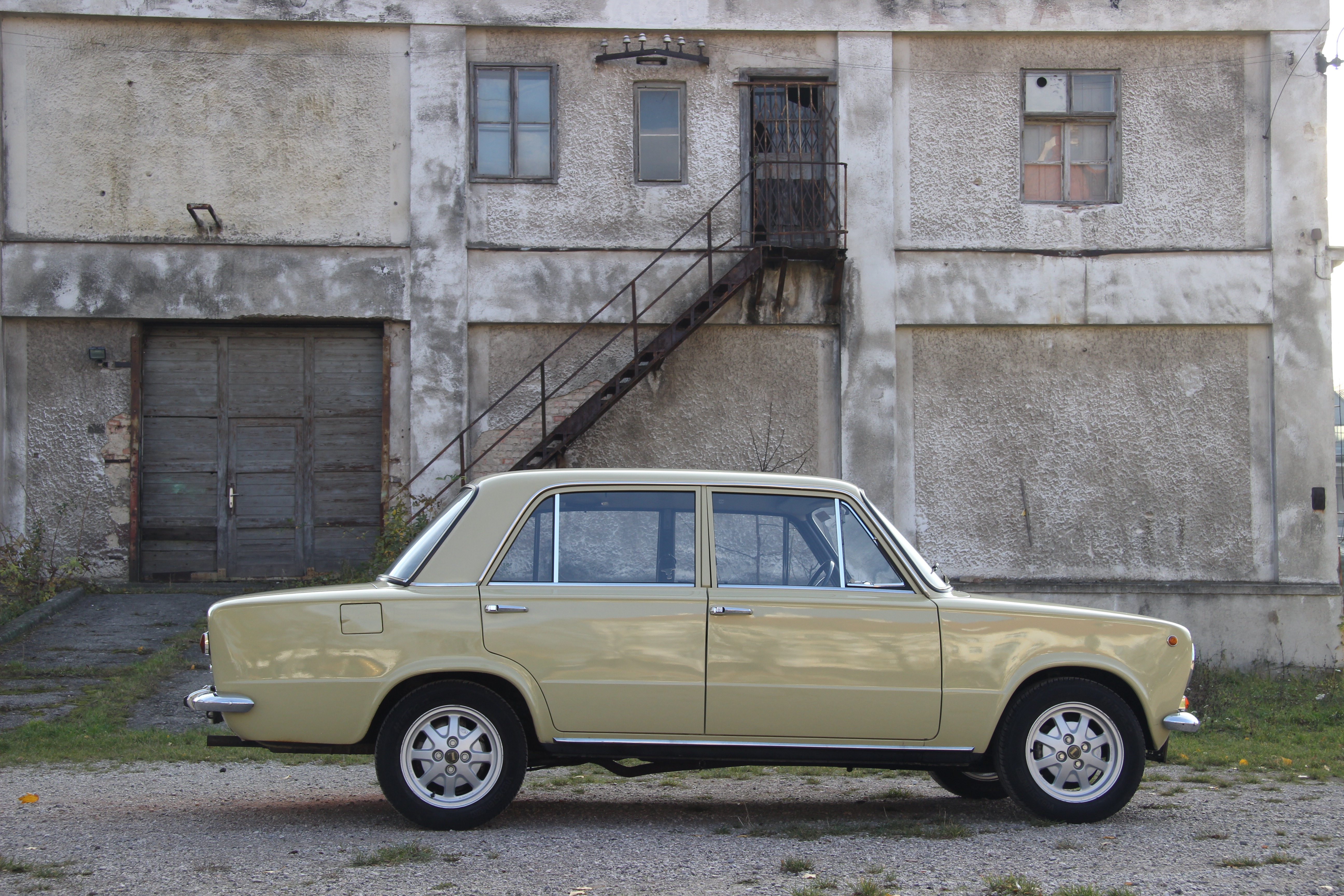 Wunderschöner Fiat 124 vor alter Industrieruine in Tribuswinkel, Retrowerk at